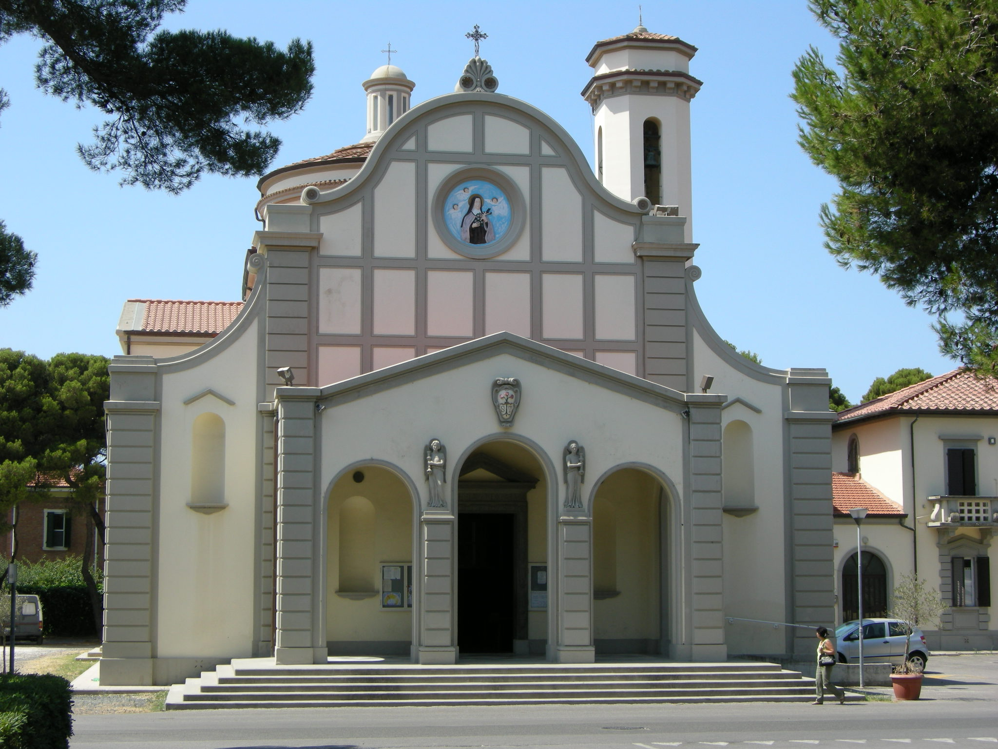 Chisa di santa teresa del bambin gesù, rosignano solvay